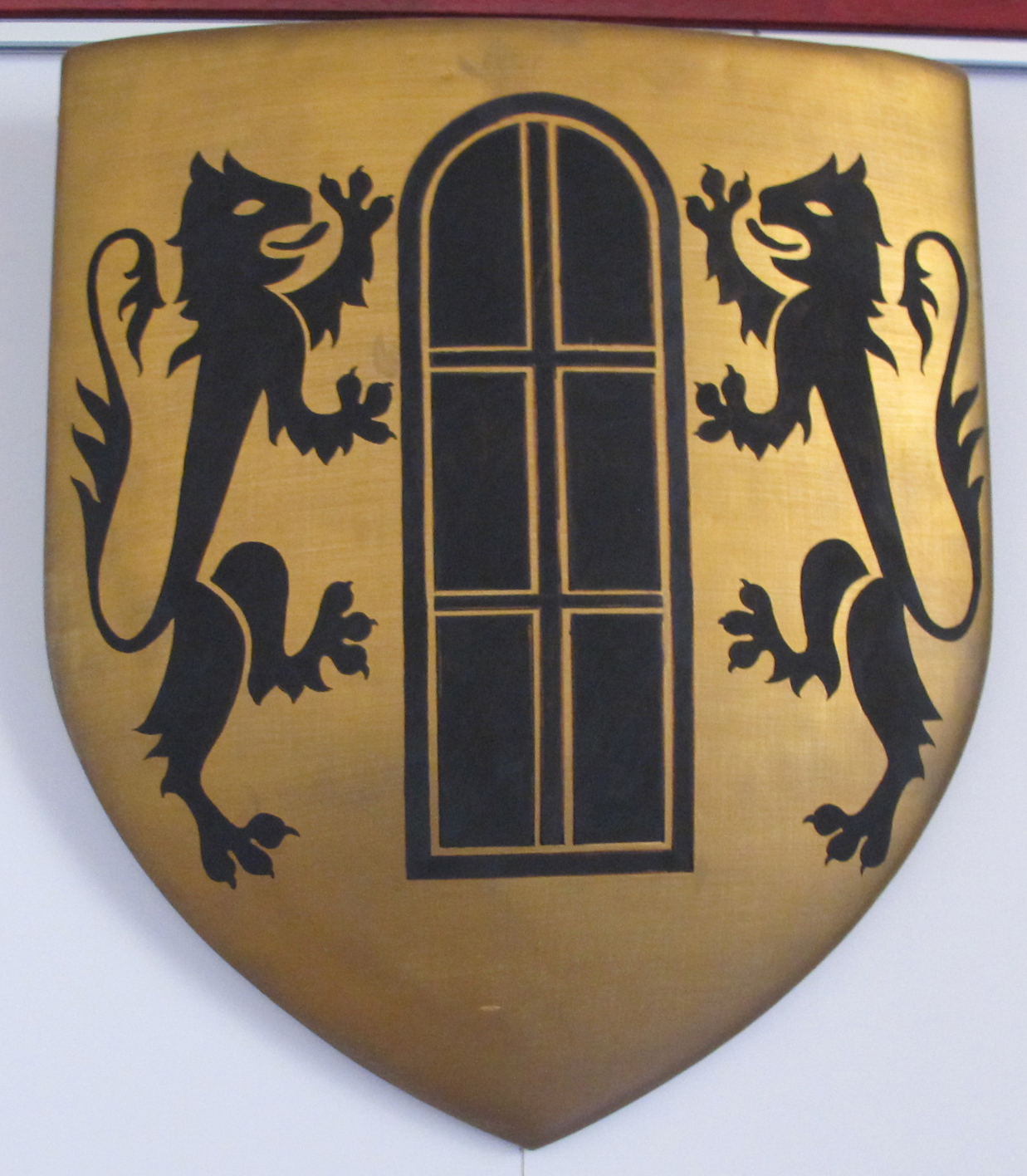 Casa di dante, fi, stemma portinari